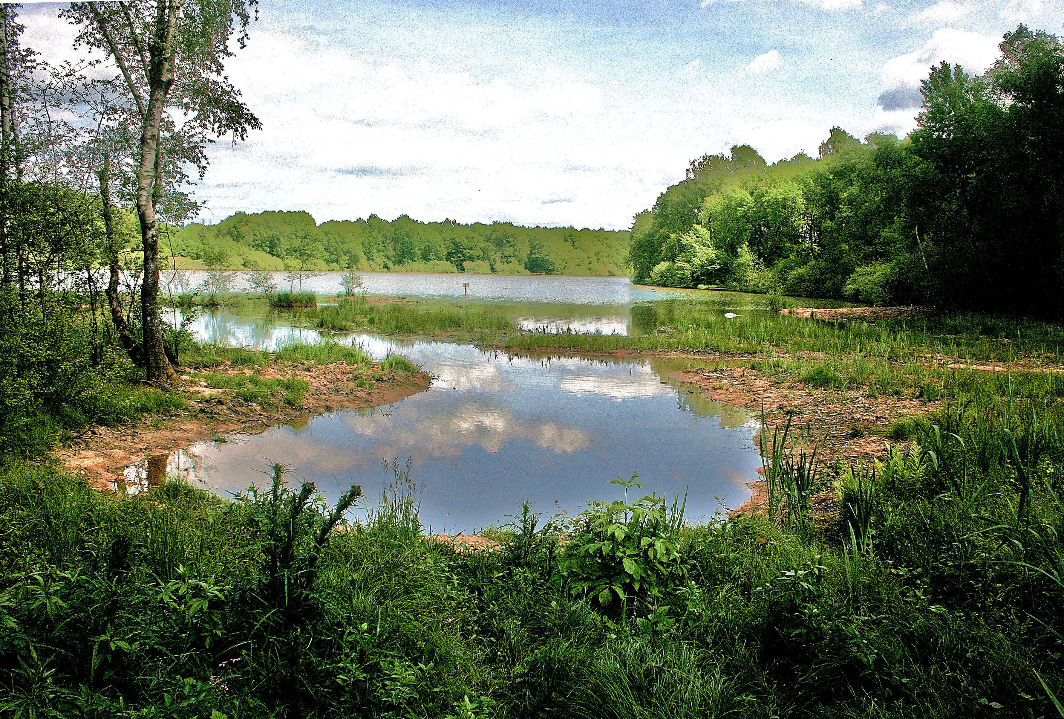 Etang de la Véronne.